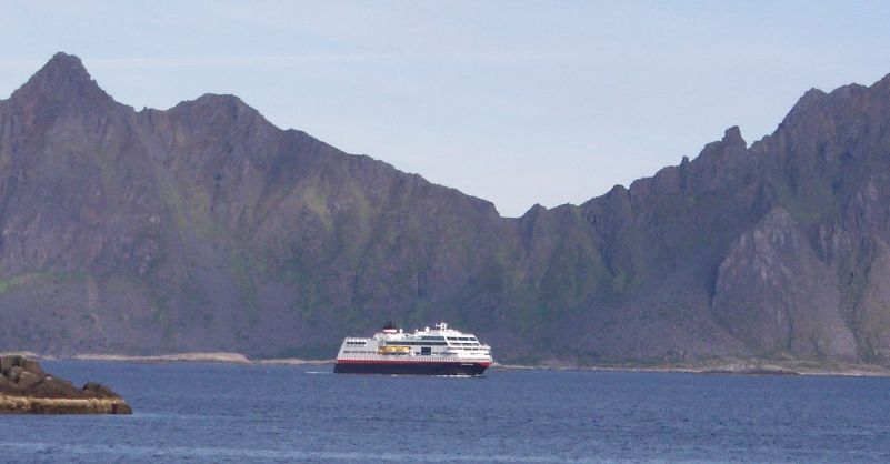 Description: Ein Schiff der Hurtigruten (Midnatsol) vor der typischen Lofotenkulisse Date: 10. Aug 2004 Author: Stahlkocher Source: Bild:Hurtigrutenschiff_bei_den_Lofoten.jpg Uploader: sgm